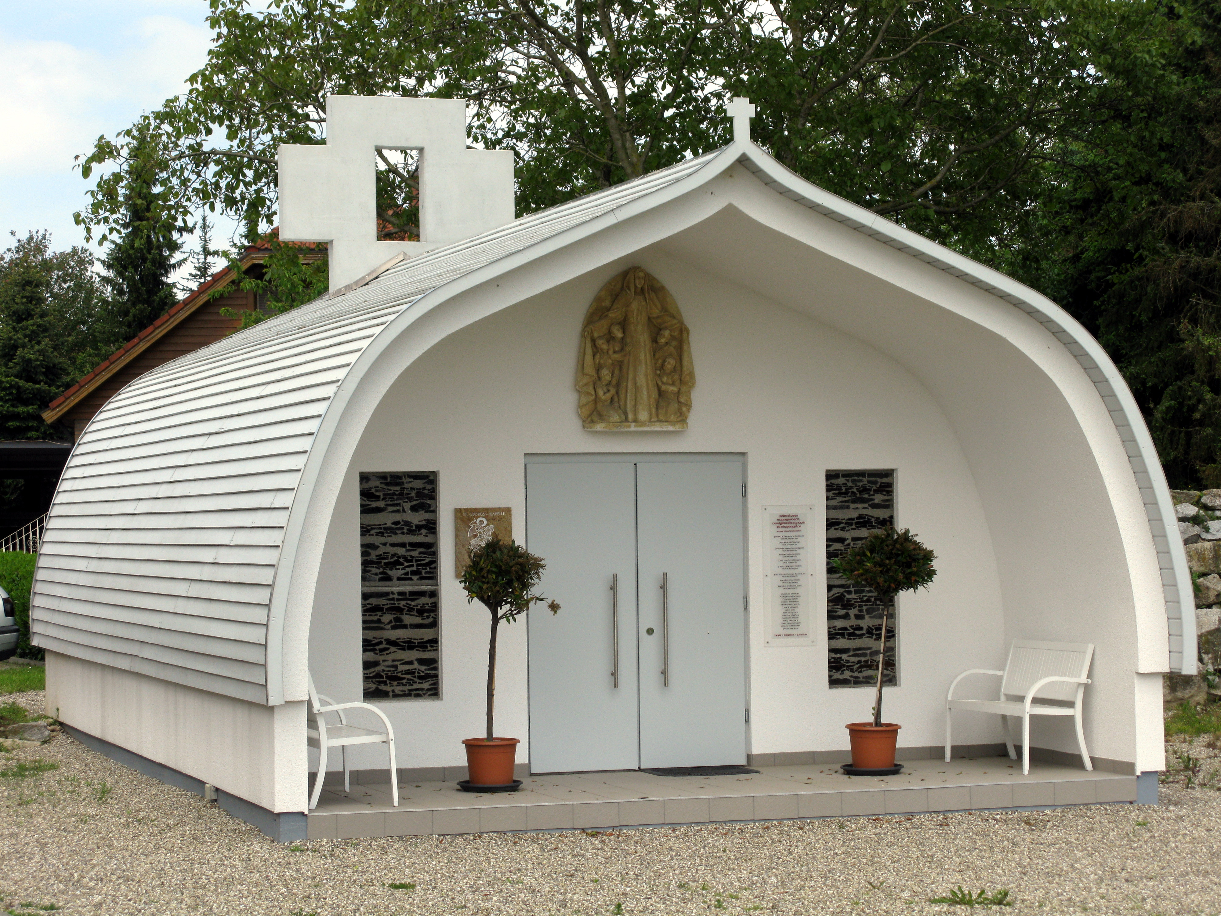 St. Georgs-Kapelle, erbaut als Dank, dass der Hochseilartist Johann Traber jr. den Unfall 2006 in Hamburg überlebte